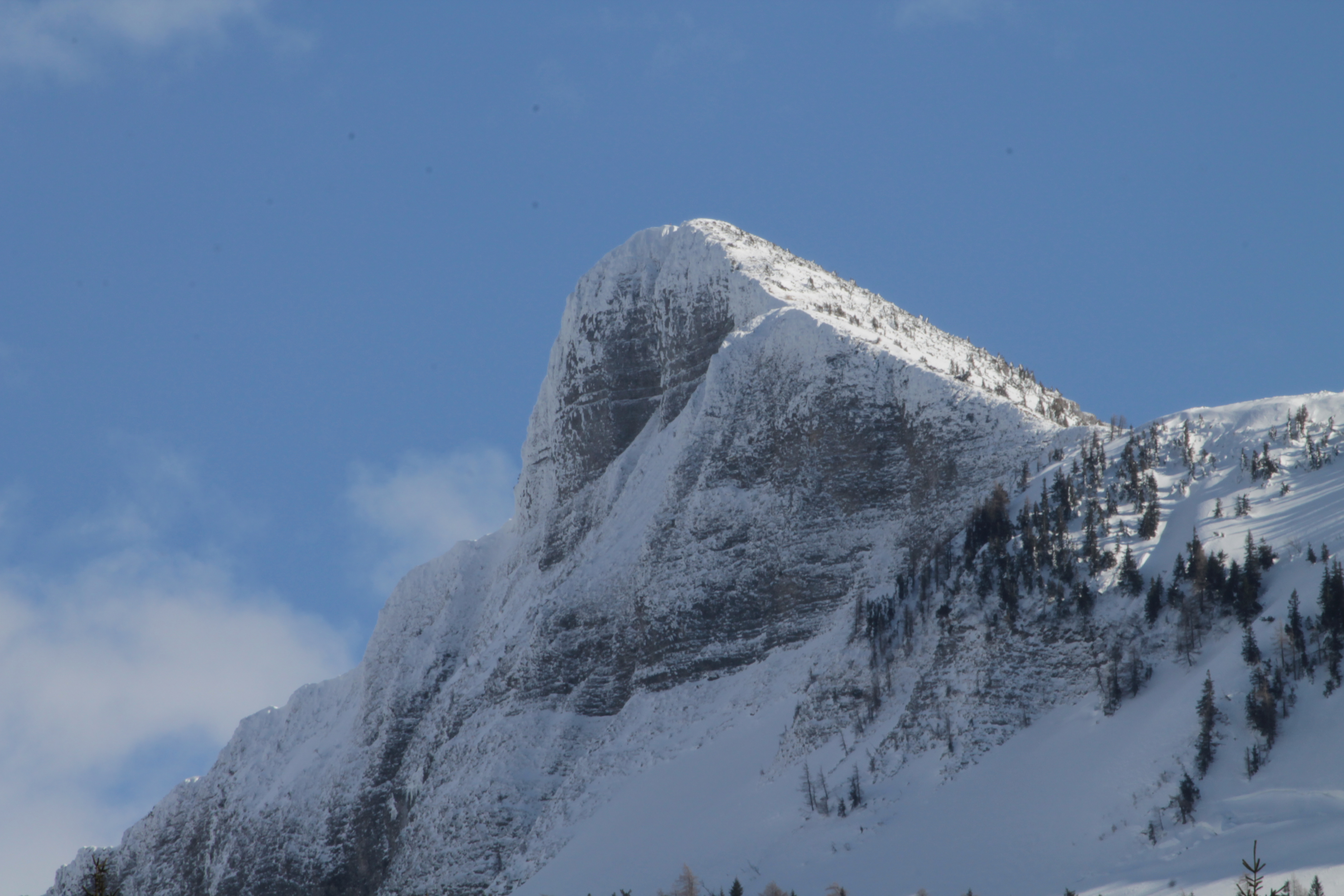 Bräuningzinken von Blaa-Alm aus gesehen